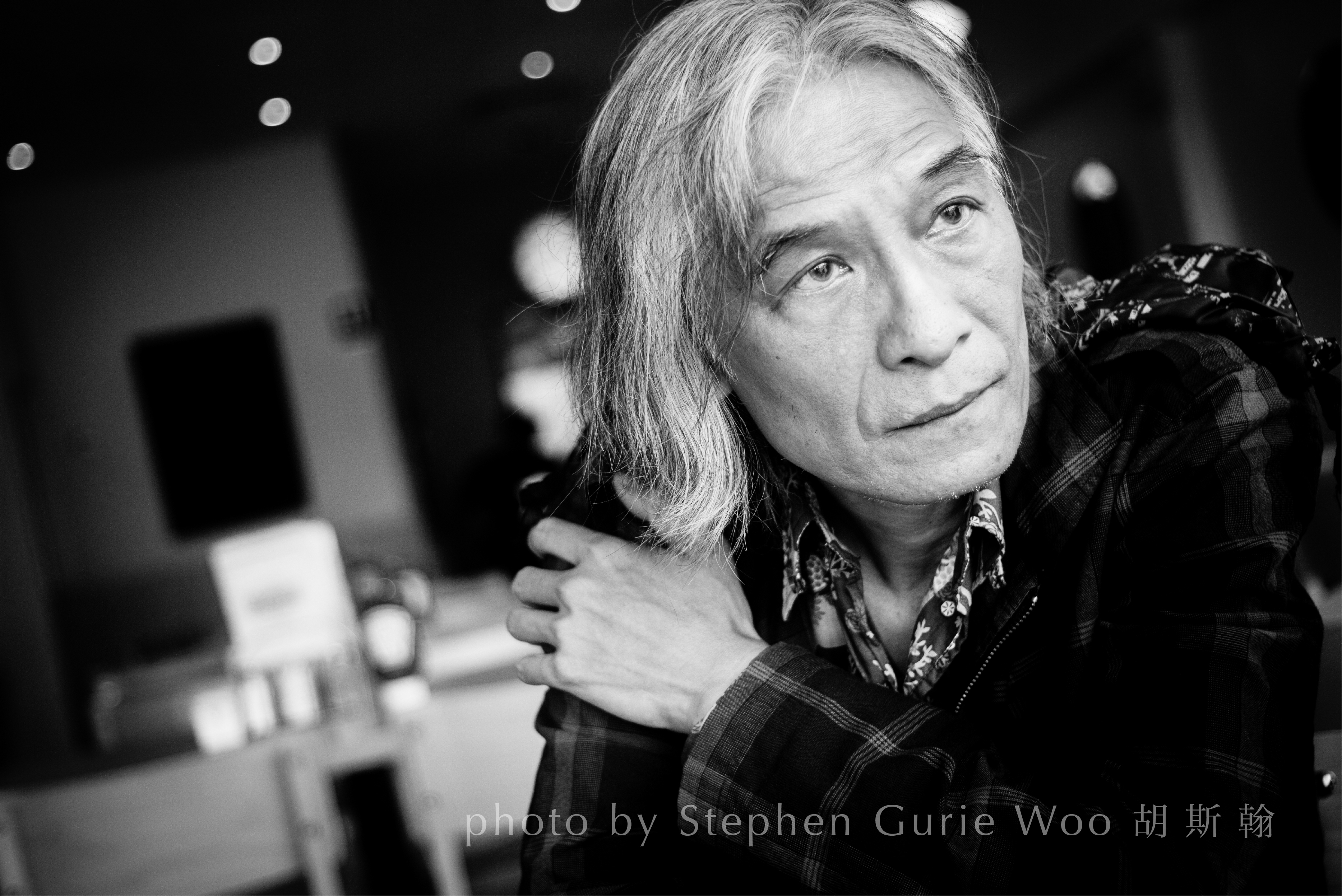 潘源良不斷構思著新創作